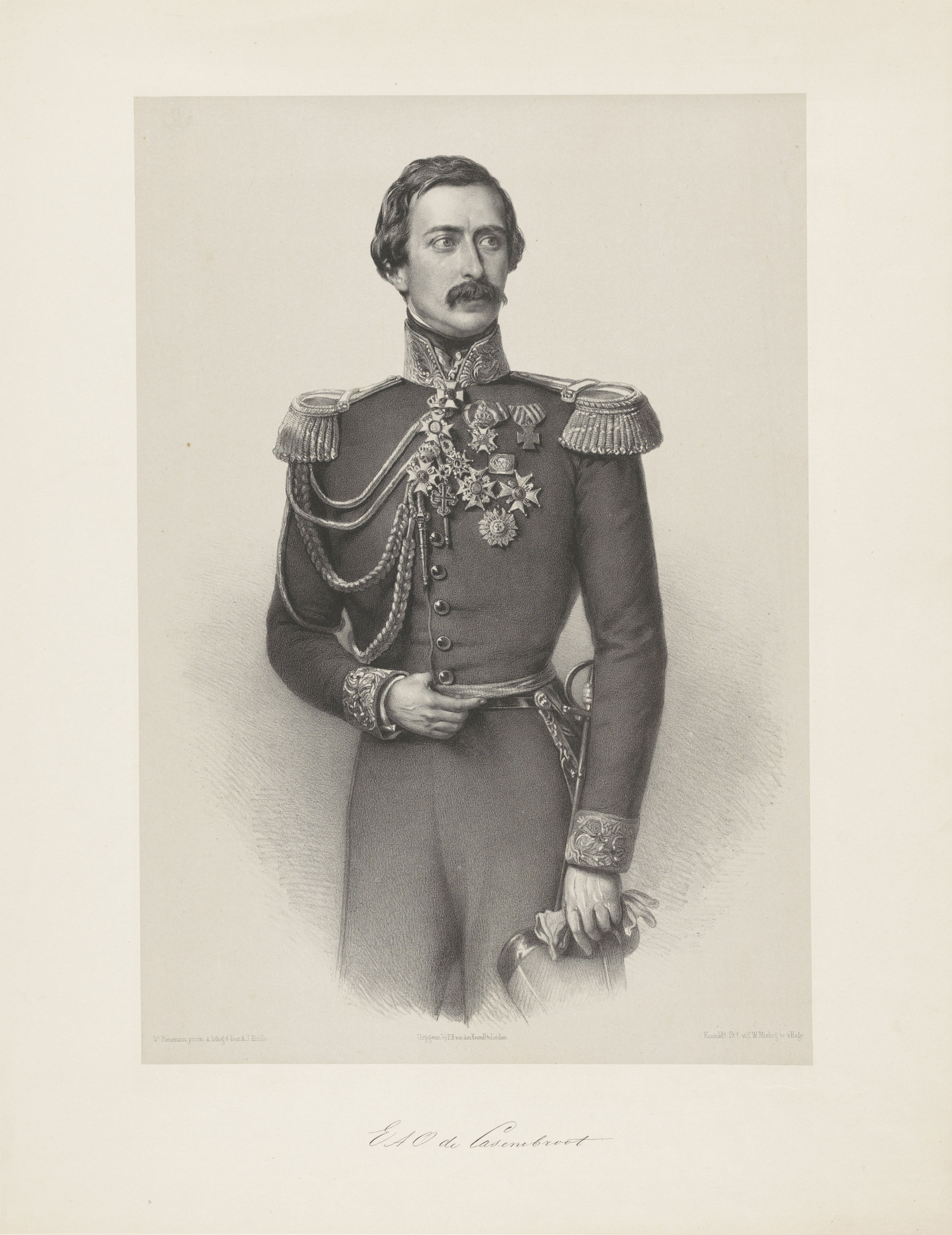 IdentificatieTitel(s): Portret van Eduard August Otto de CasembrootObjecttype: prent Objectnummer: RP-P-OB-28.097Catalogusreferentie: Van Someren 1016Opschriften / Merken: verzamelaarsmerk, verso, gestempeld: Lugt 2228Omschrijving: De geportretteerde draagt een militair uniform en kijkt naar rechts. Met zijn rechterhand houdt hij zijn riem vast, in zijn linkerhand heeft hij zijn handschoenen en kepi. Op zijn borst draagt hij onderscheidingen en aan zijn riem hangt een sabel. Onder het portret zijn signatuur.VervaardigingVervaardiger: prentmaker: Adrianus Johannes Ehnle (vermeld op object)naar ontwerp van: Nicolaas Pieneman (vermeld op object)drukker: Koninklijke Nederlandse Steendrukkerij van C.W. Mieling (vermeld op object)uitgever: P.H. van den Heuvell (vermeld op object)Plaats vervaardiging: prentmaker: Haarlemdrukker: Den Haaguitgever: LeidenDatering: 1857 - 1863Fysieke kenmerken: lithografie op chine colléMateriaal: papier chine collé Techniek: lithografie (techniek)Afmetingen: blad: h 543 mm × b 420 mmOnderwerpWat: historical persons (+ three-quarter length portrait)knighthood orderhacking and thrusting weapons (with NAME)Wie: Eduard August Otto de CasembrootVerwerving en rechtenVerwerving: onbekend 2006Copyright: Publiek domein